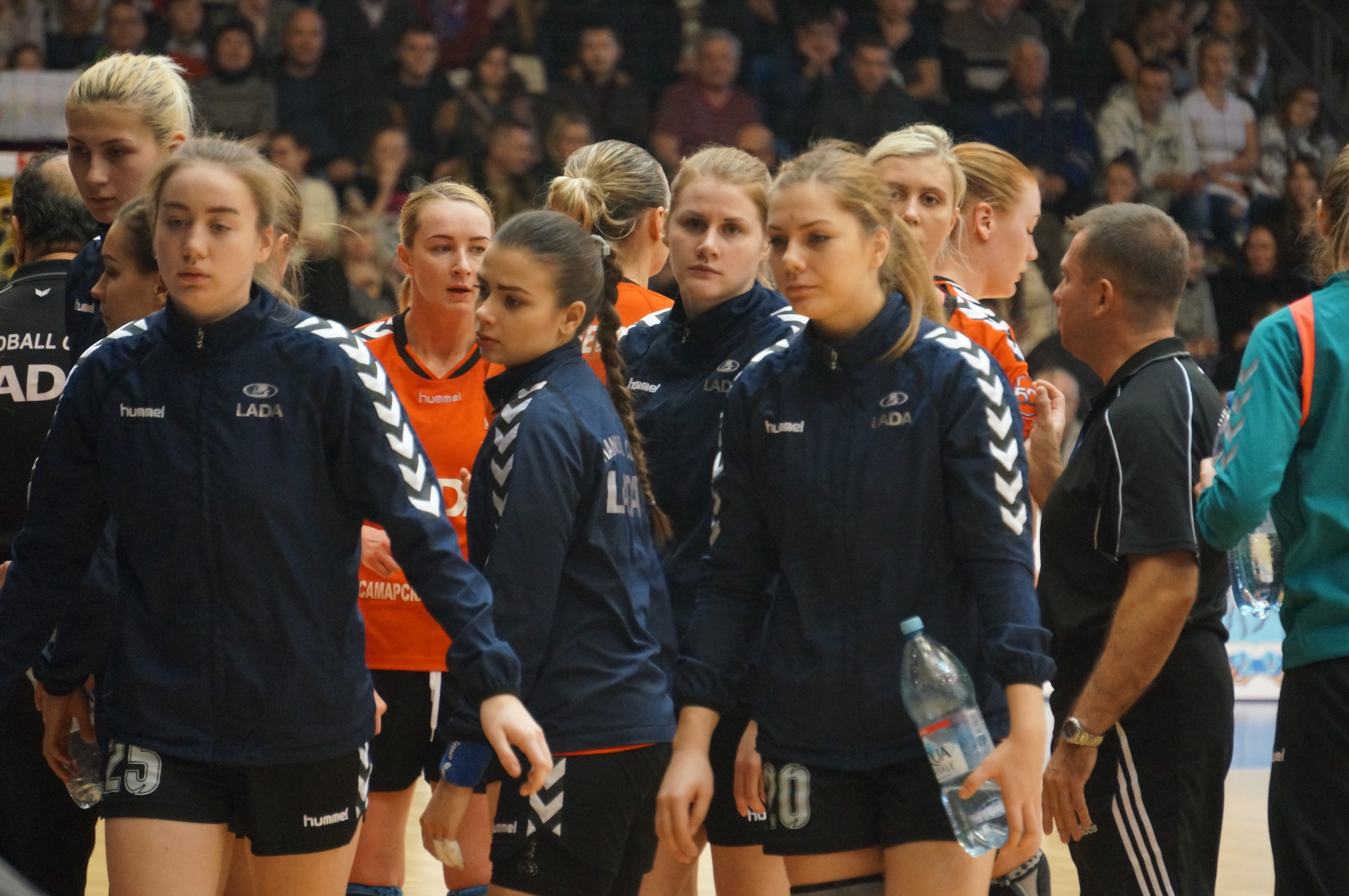 Матч Кубка ЕГФ "Лада" (Тольятти) - "Виборг" (Виборг). Тольятти, Россия, 13 ноября 2016. Игроки ГК "Лада" идут на тайм-аут. Виолетта Голец (20), Ольга Щербак (25) и др